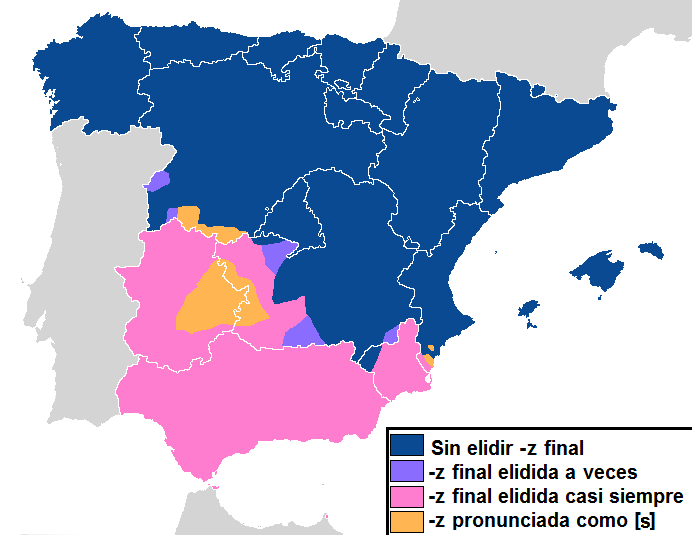 Elusión de la -z en el español de Europa.